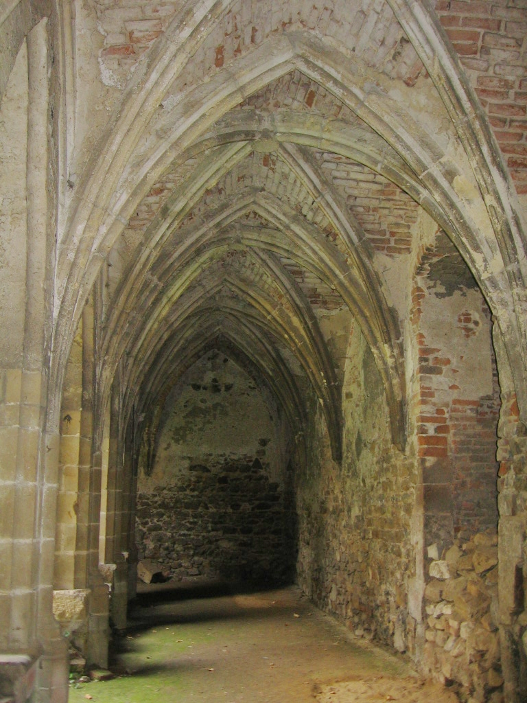 Křížová chodba kláštera v Dolních Kounicích. The corridor in monastery in Dolní Kounice.